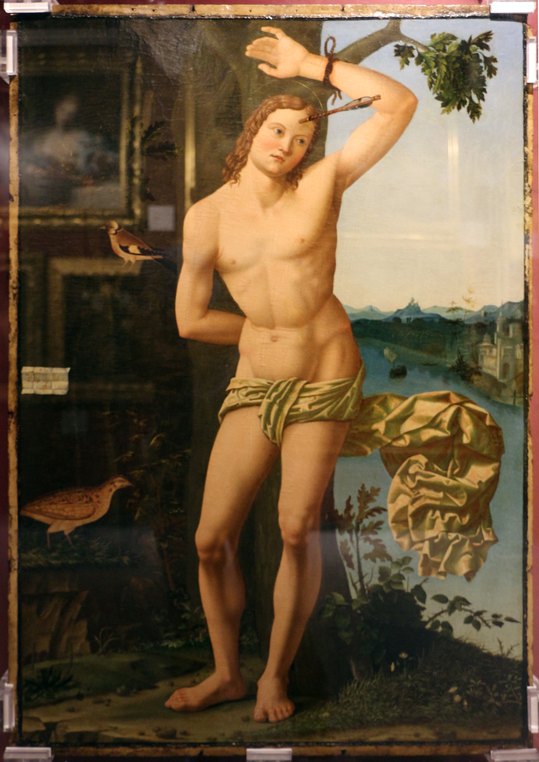 san sebastiano